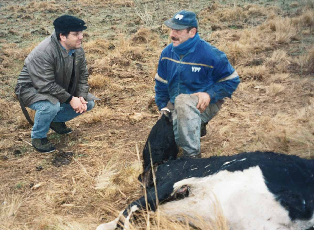 Argentine Journalist Alejandro Agostinelli